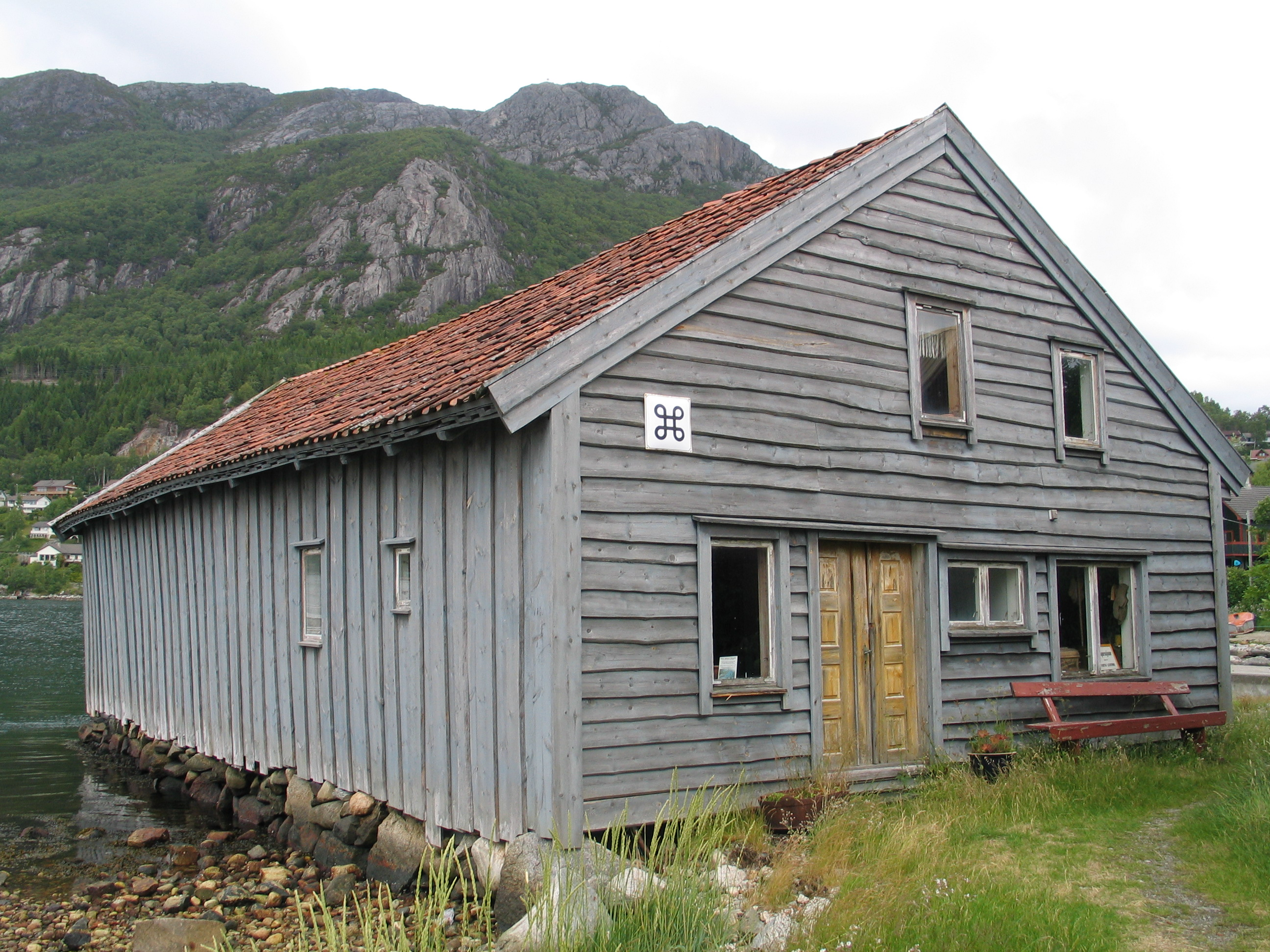 Sjøhuset i Bergevik, no eit museum.